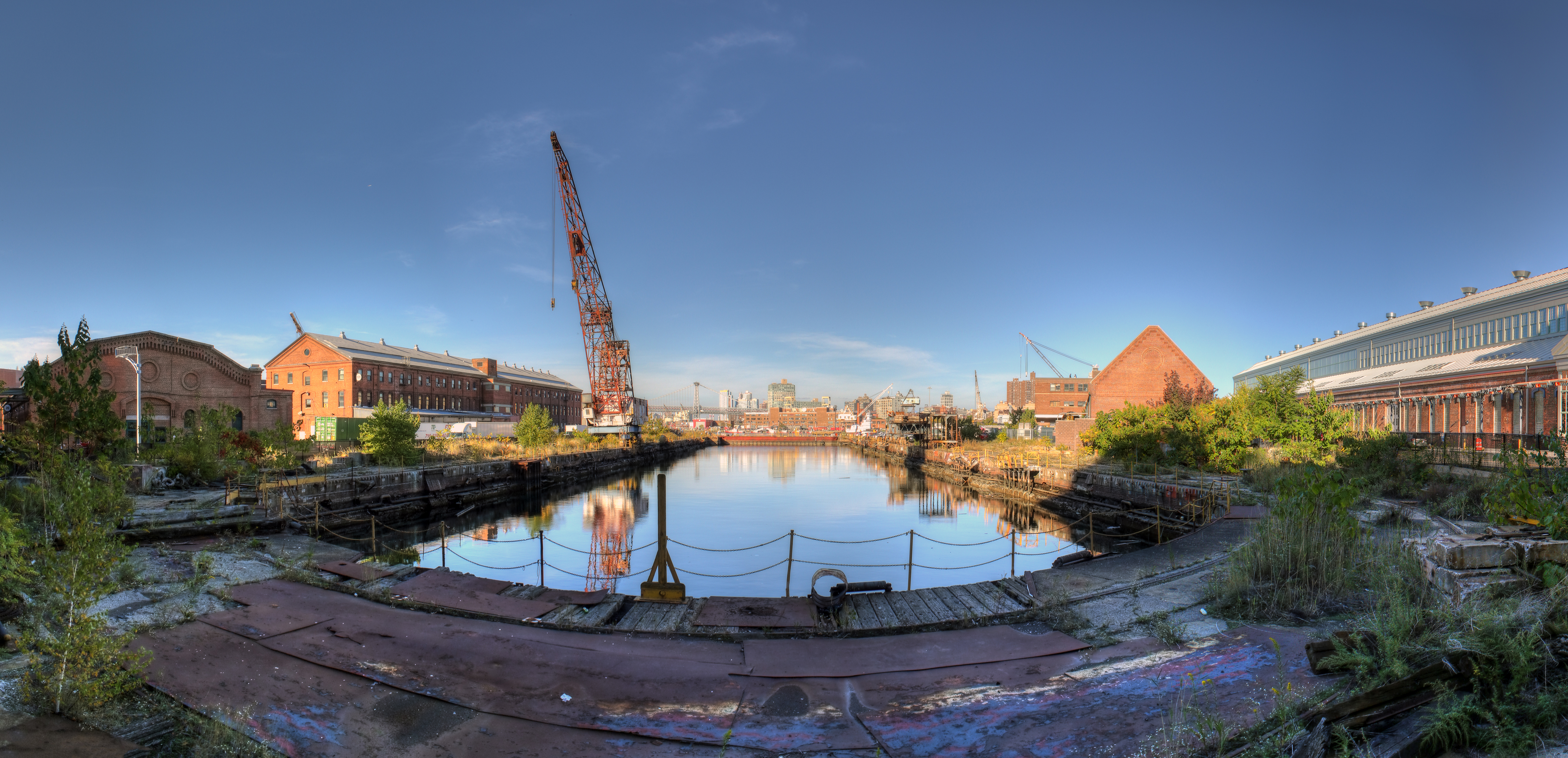 Site: Brooklyn Navy Yard